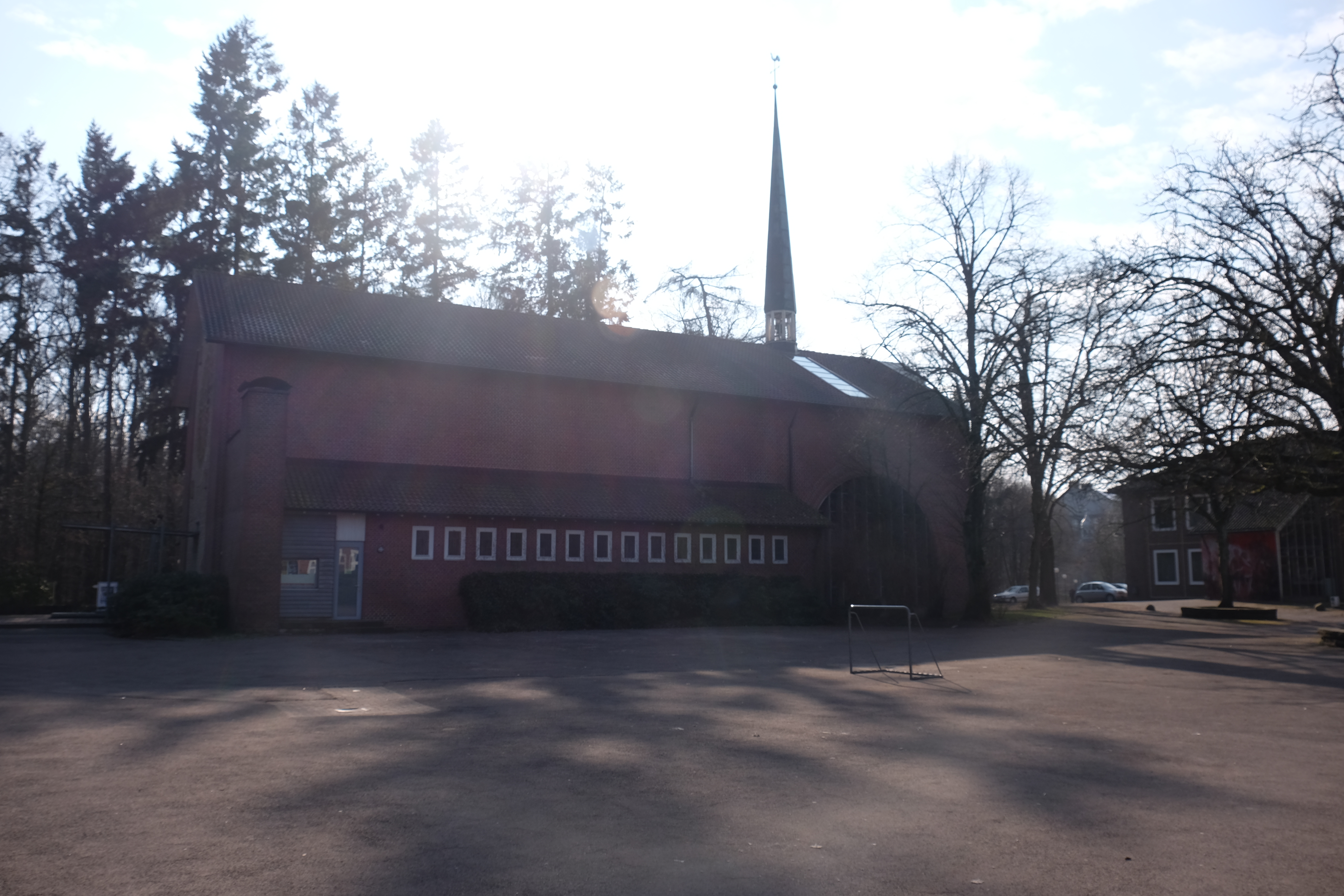 Rundgang über die Loburg 2018